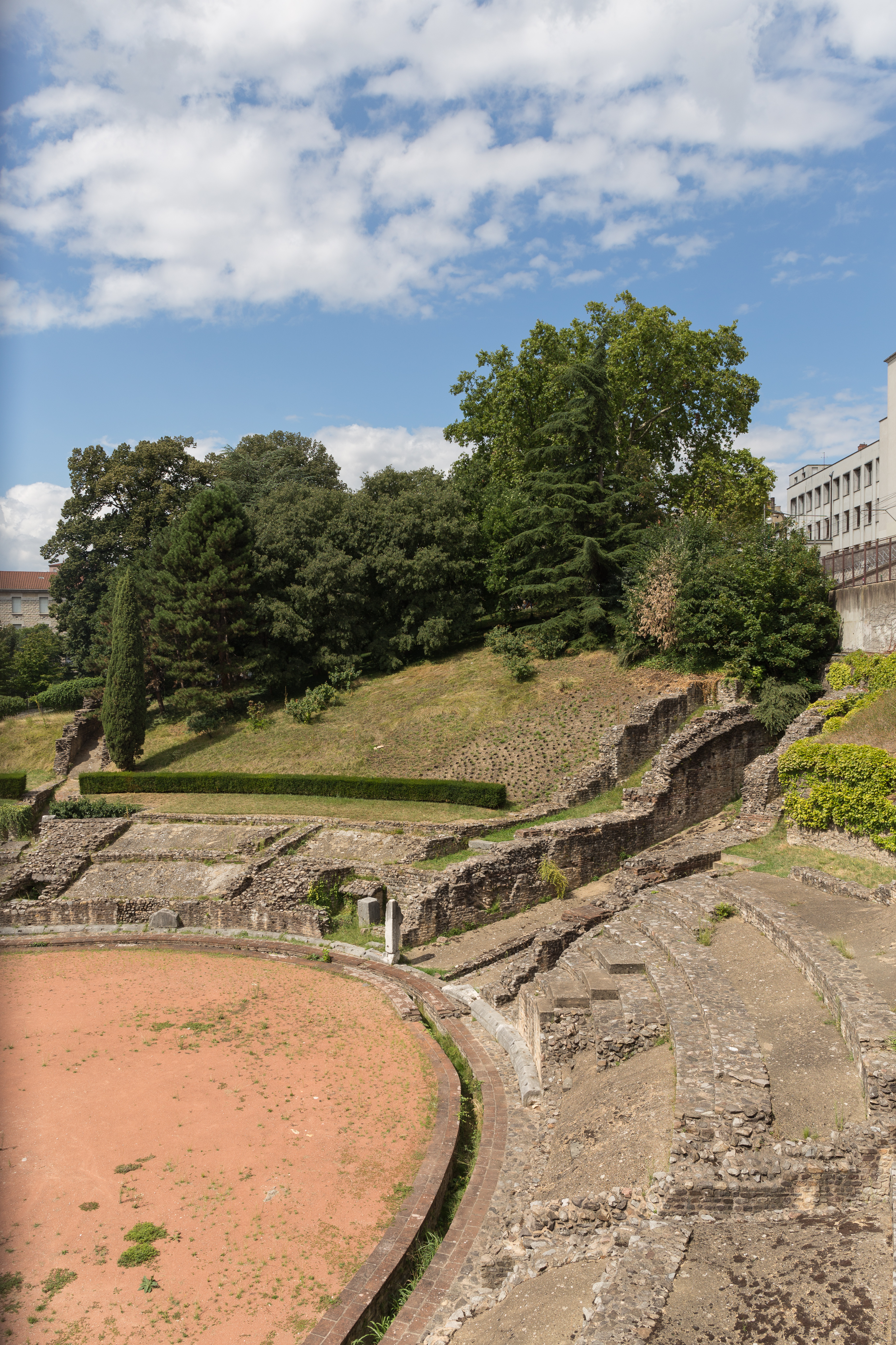 Amphithéâtre des Trois Gaules dans le 1er arrondissement de Lyon. .